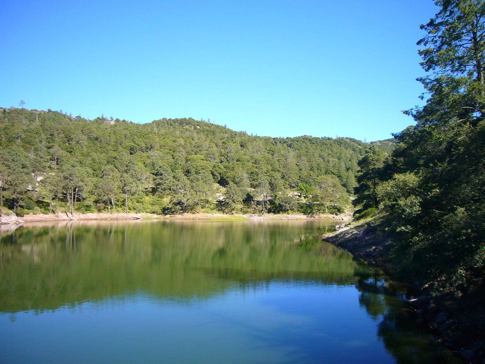 La presa de El cedral en el parque nacional El Chico, en el estado de Hidalgo, México.